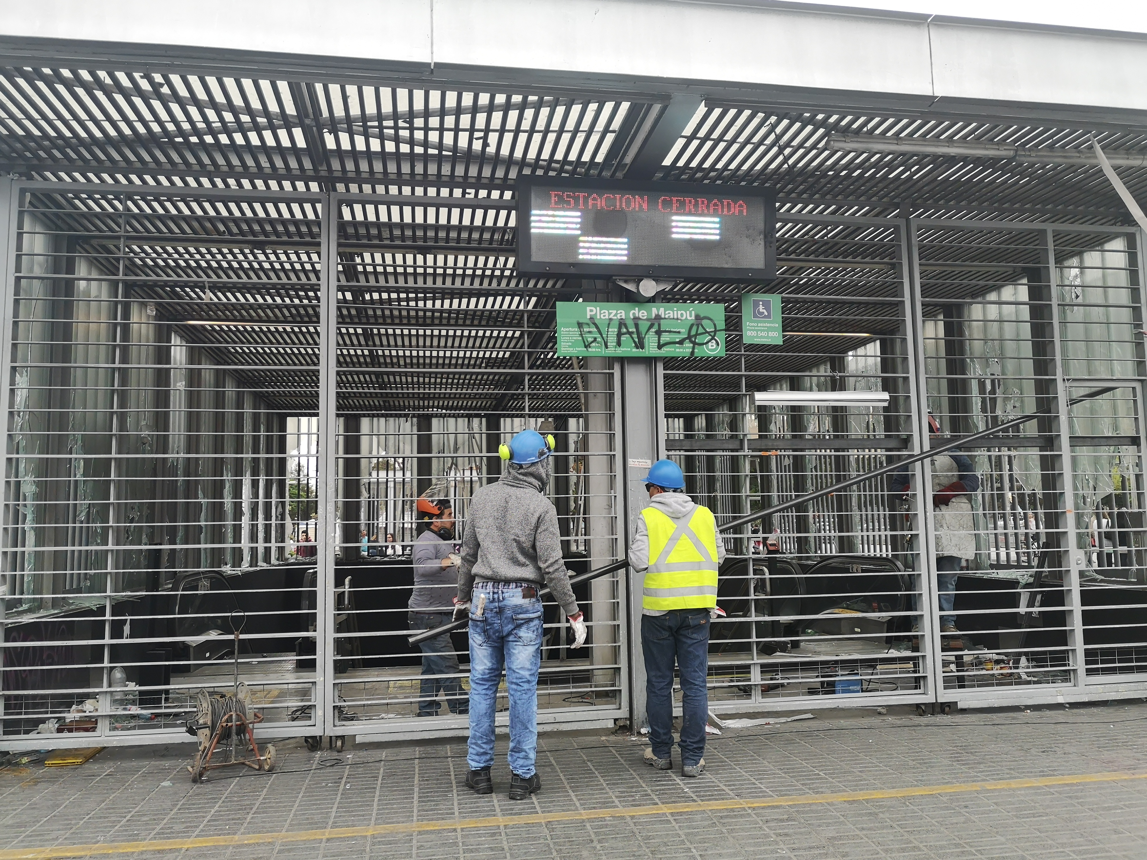 Trabajadores reforzando acceso estación Plaza de Maipú del metro de Santiago después de las destrucción ocasionada en las protestas de 2019.